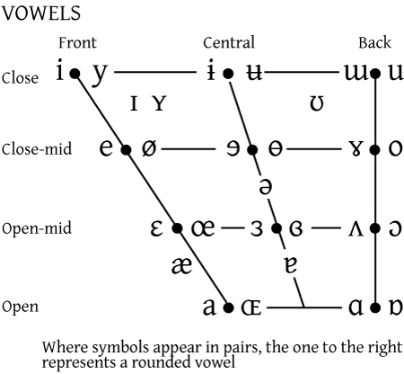 Redrawn IPA chart, vowels